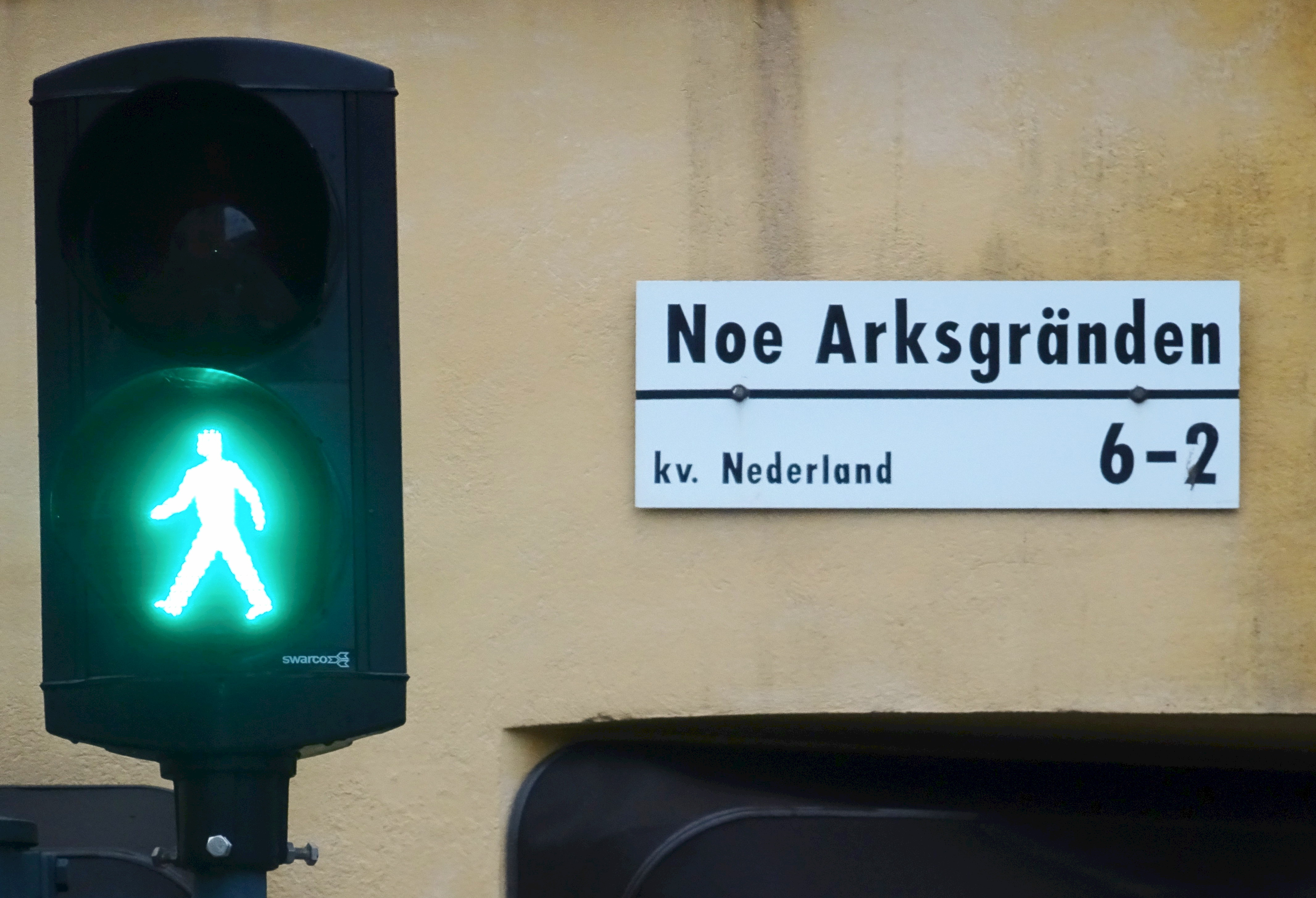 Kvarteret Nederland, Götgatan 46 / Noe Arksgränden 2